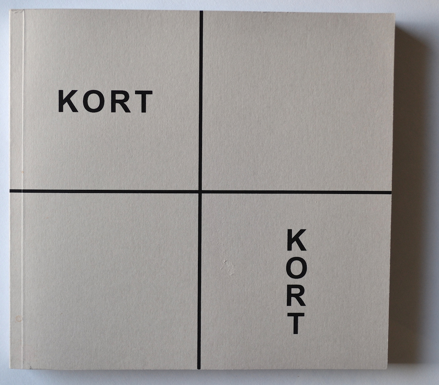 KORT (haiku)